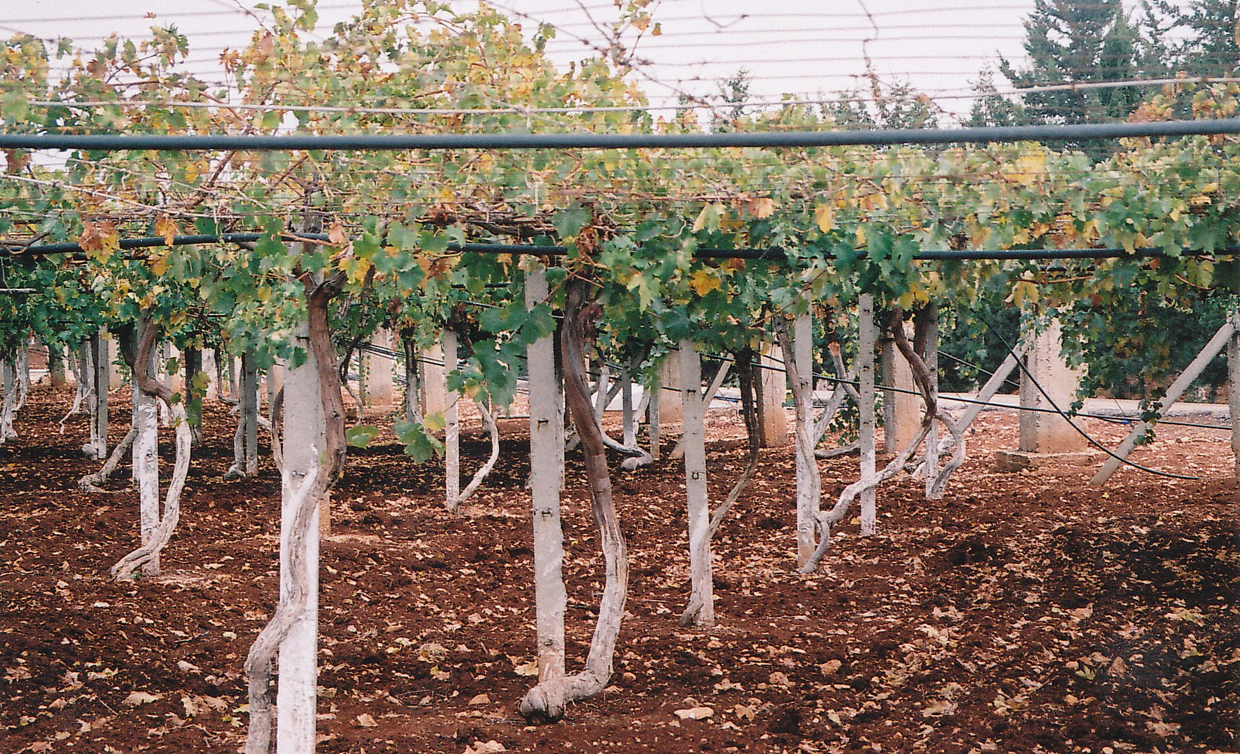 Pergolerziehung mit Drahtnetzunterstuetzung in Syrien